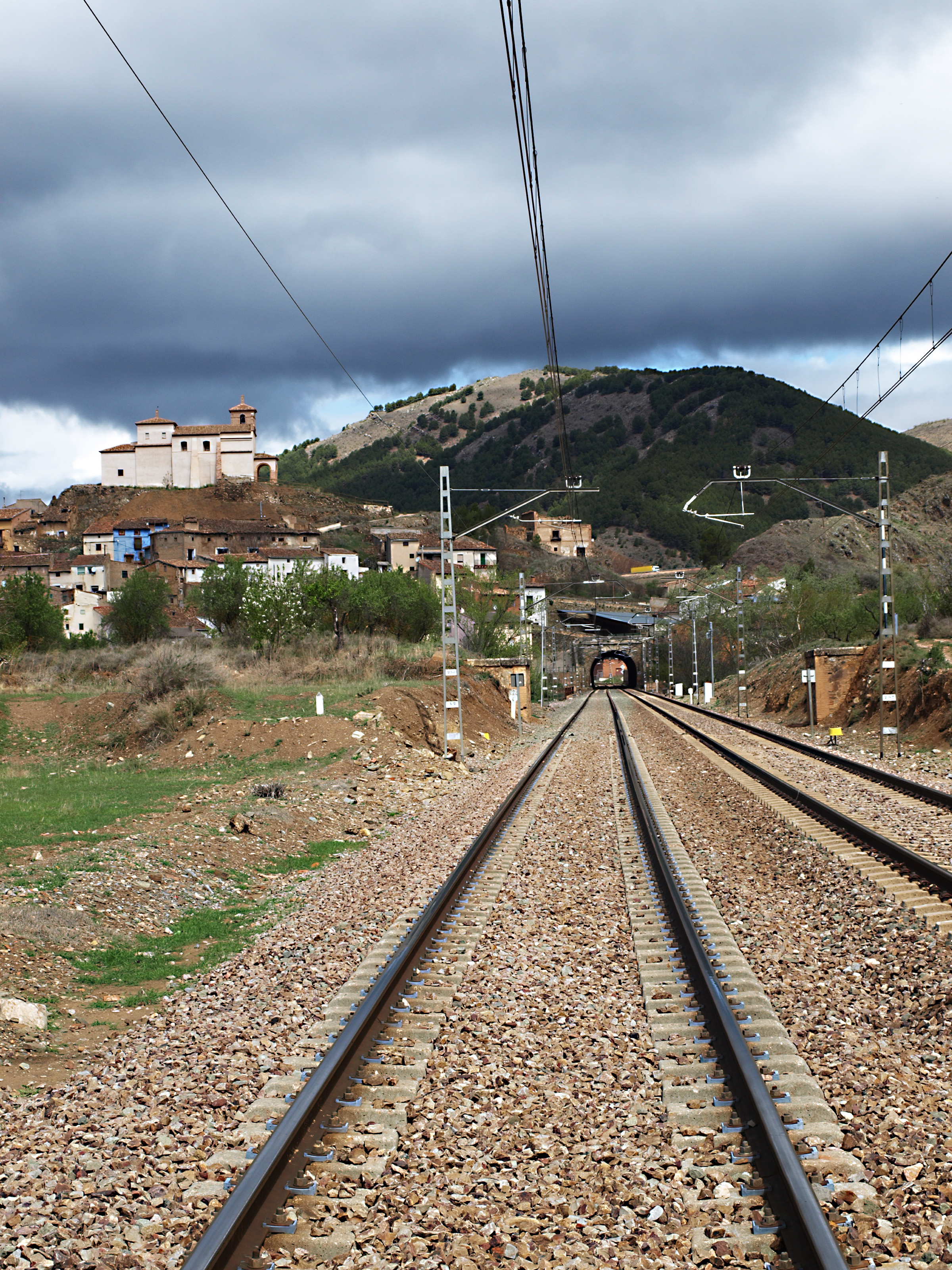 Riberas del Jalón (Bubierca - Ateca)